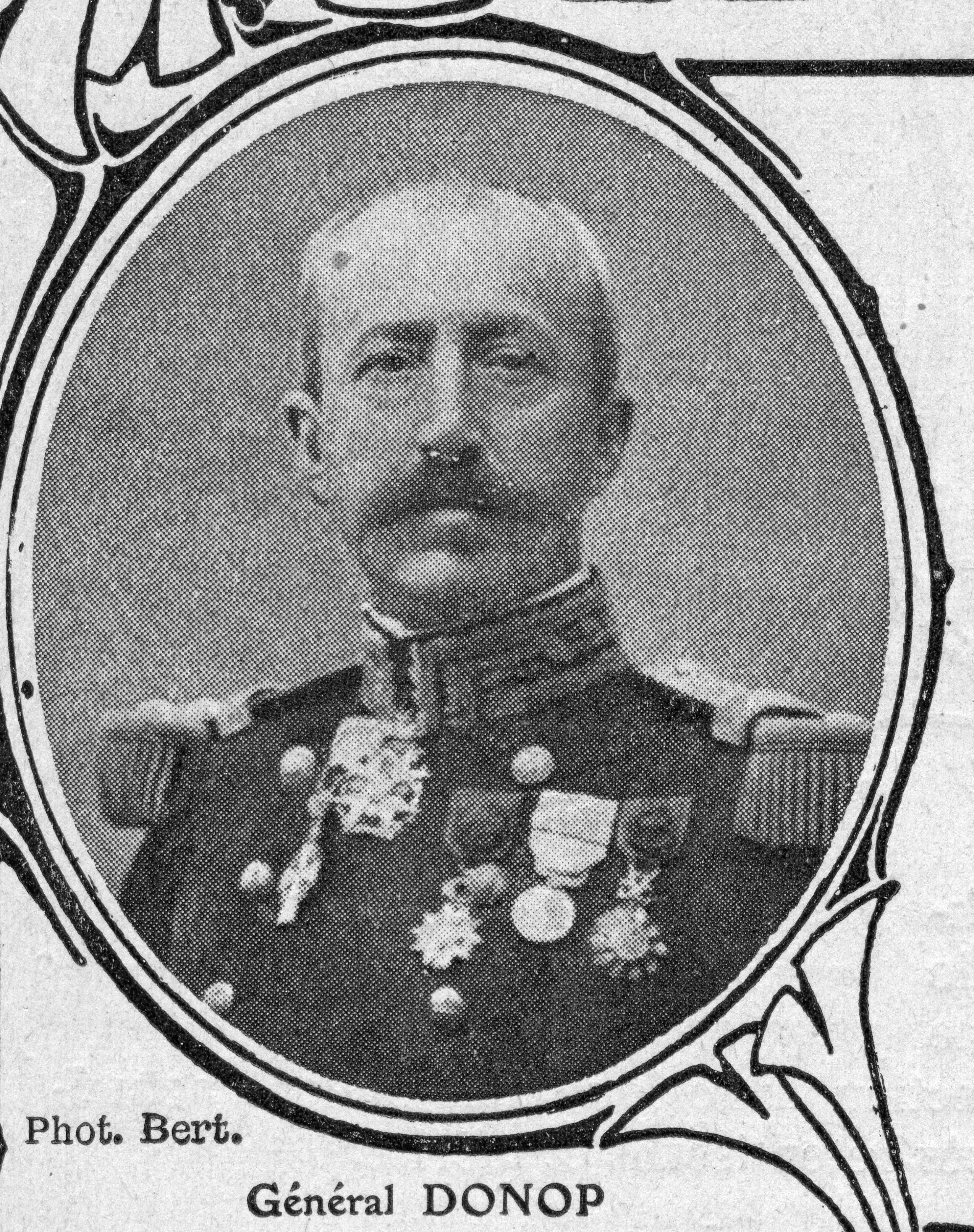 Touche à tout 1910 1er semestre p 283 Général Donop (phot. Bert.)